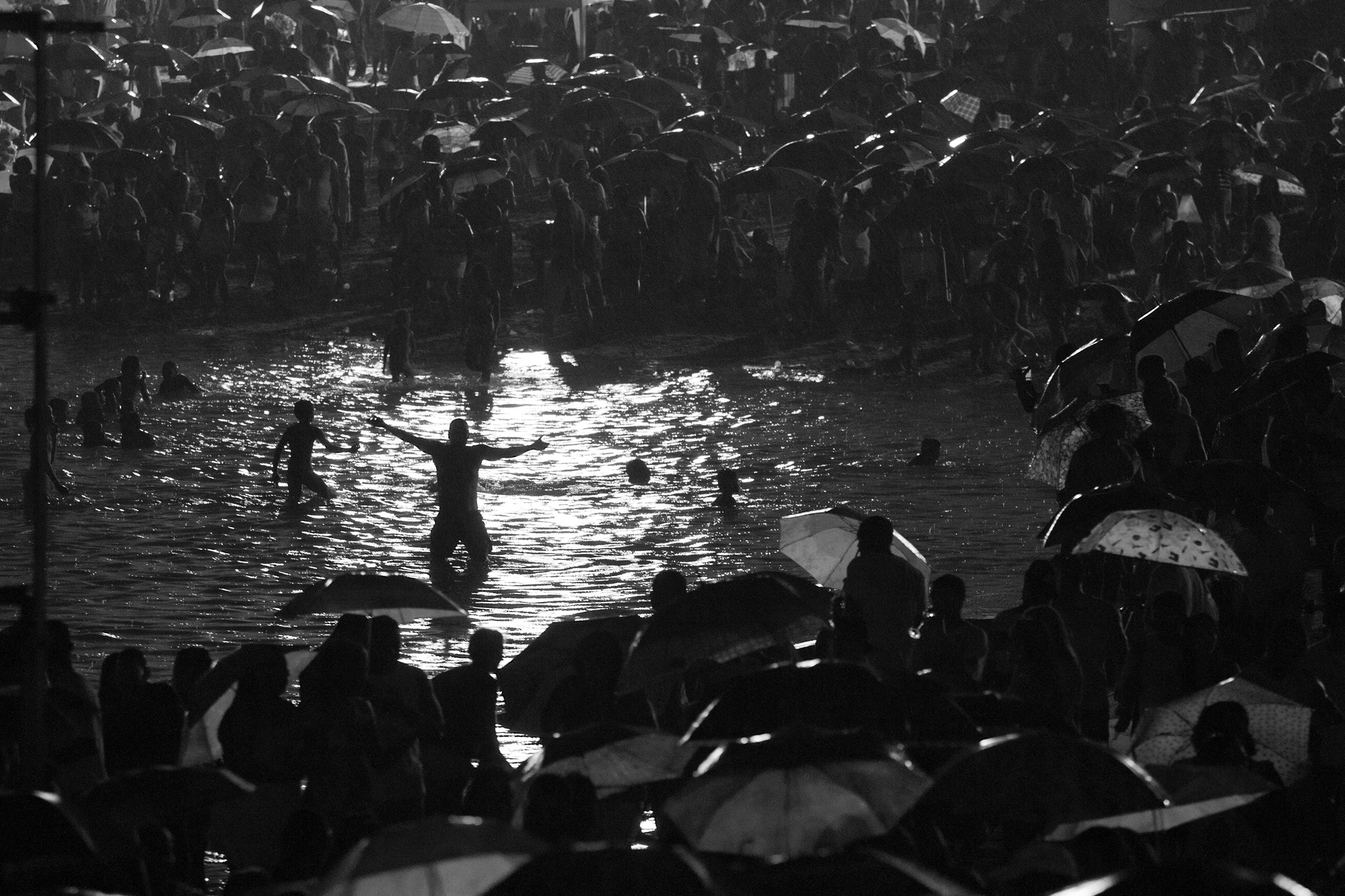 Revéillon 2011/12